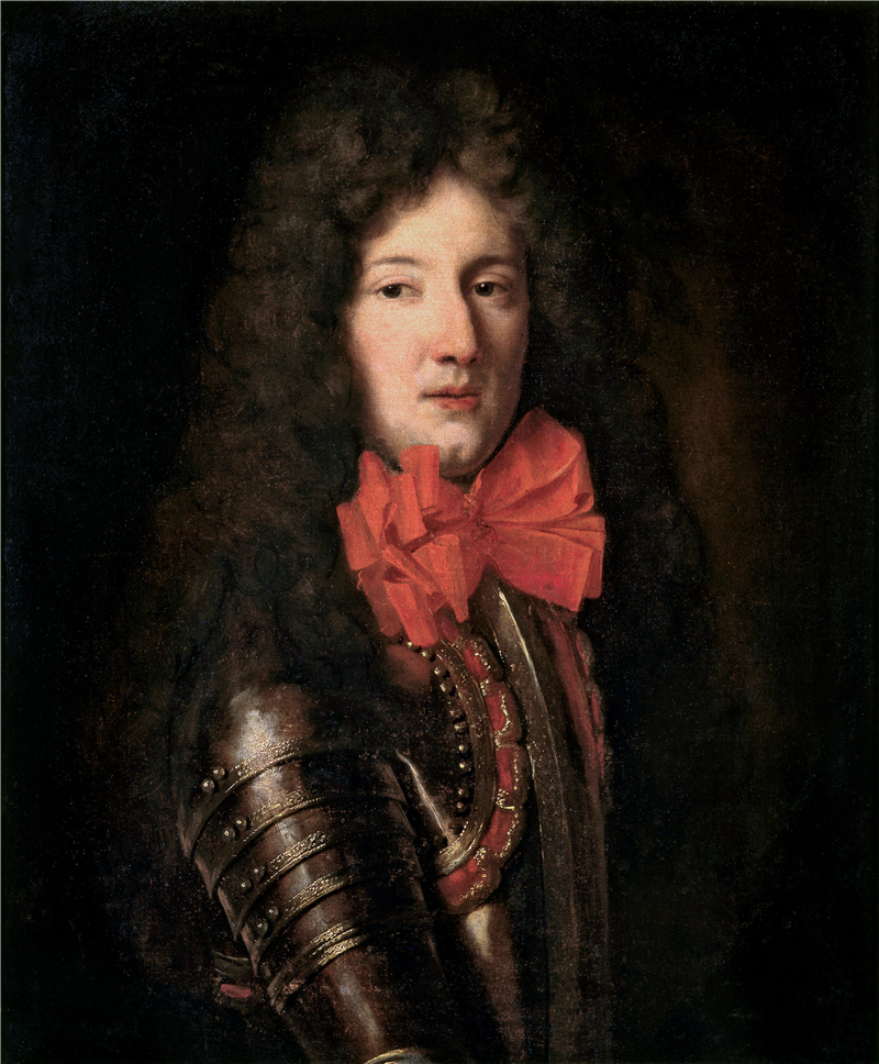 Louis Ier (Louis-Honoré) né le 25 juillet 1642 épouse le 30 mars 1660 Marie-Charlotte-Catherine de Gramont (1639-1678). Mort à Rome le 3 janvier 1701